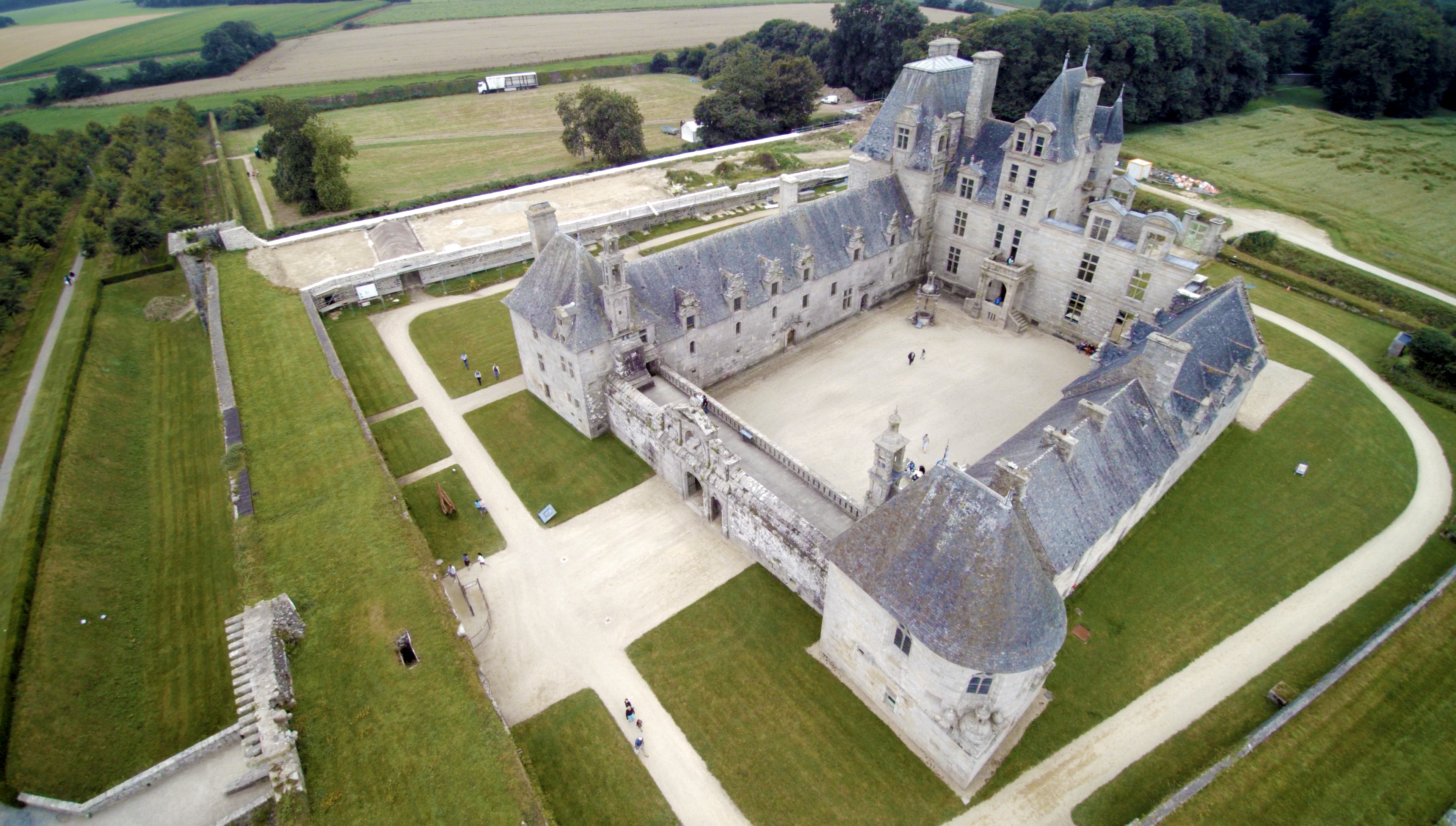 Vue aérienne du Château de Kerjean à Saint Vougay dans le nord Finistère (29440). La façade Est. Construction au XVIe siècle par la famille Barbier. De style renaissance probablement influencé de Philibert Delorme.